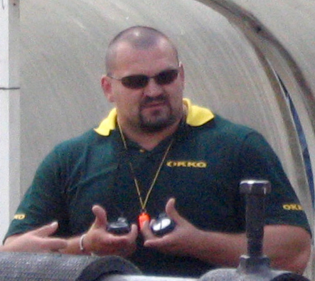 Богатирський турнір у Житомирі, 2008. На фото В.Вірастюк